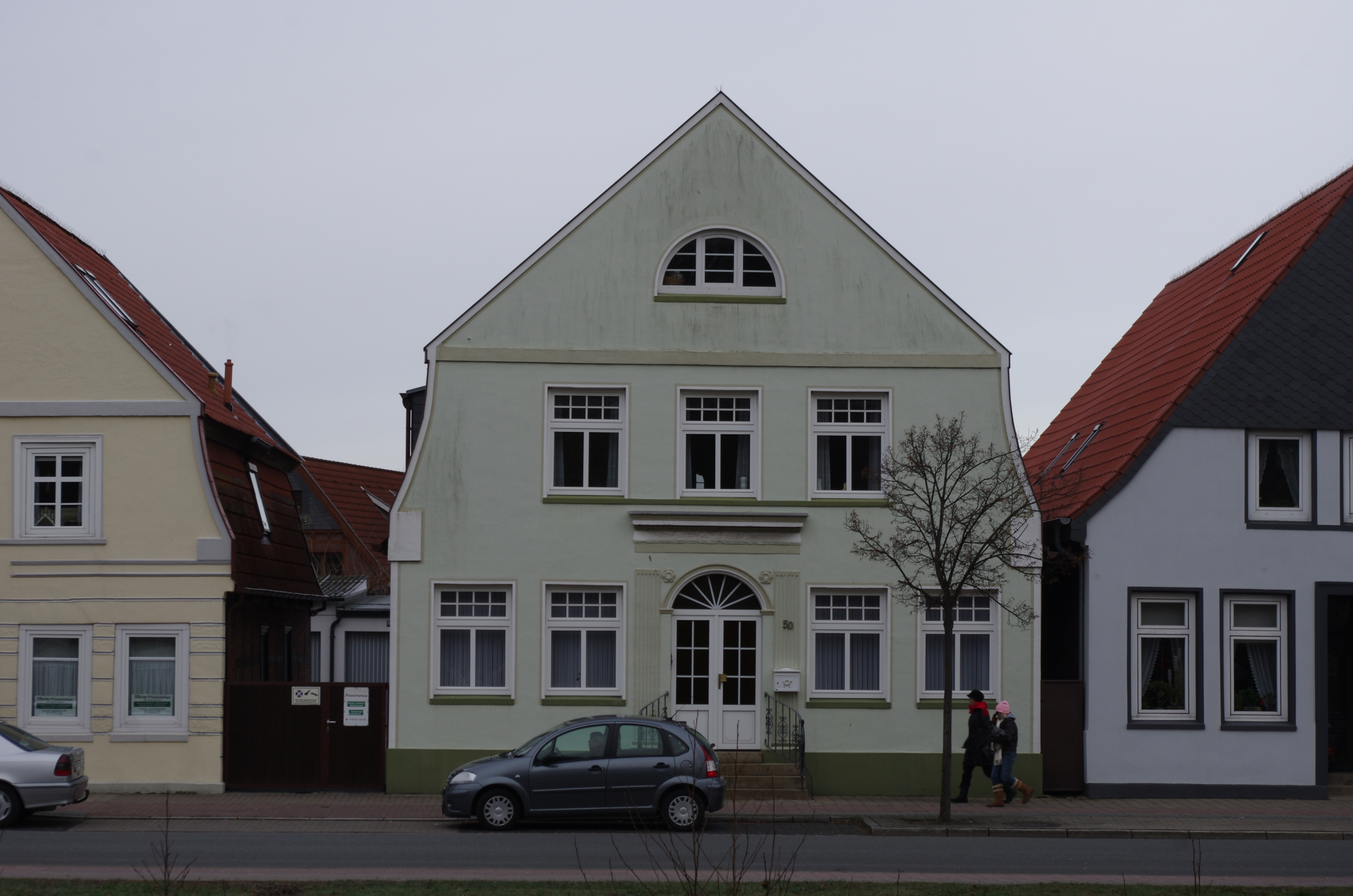 Cuxhaven in Niedersachsen. Das Haus Südersteinstraße 50 steht unter Denkmalschutz.